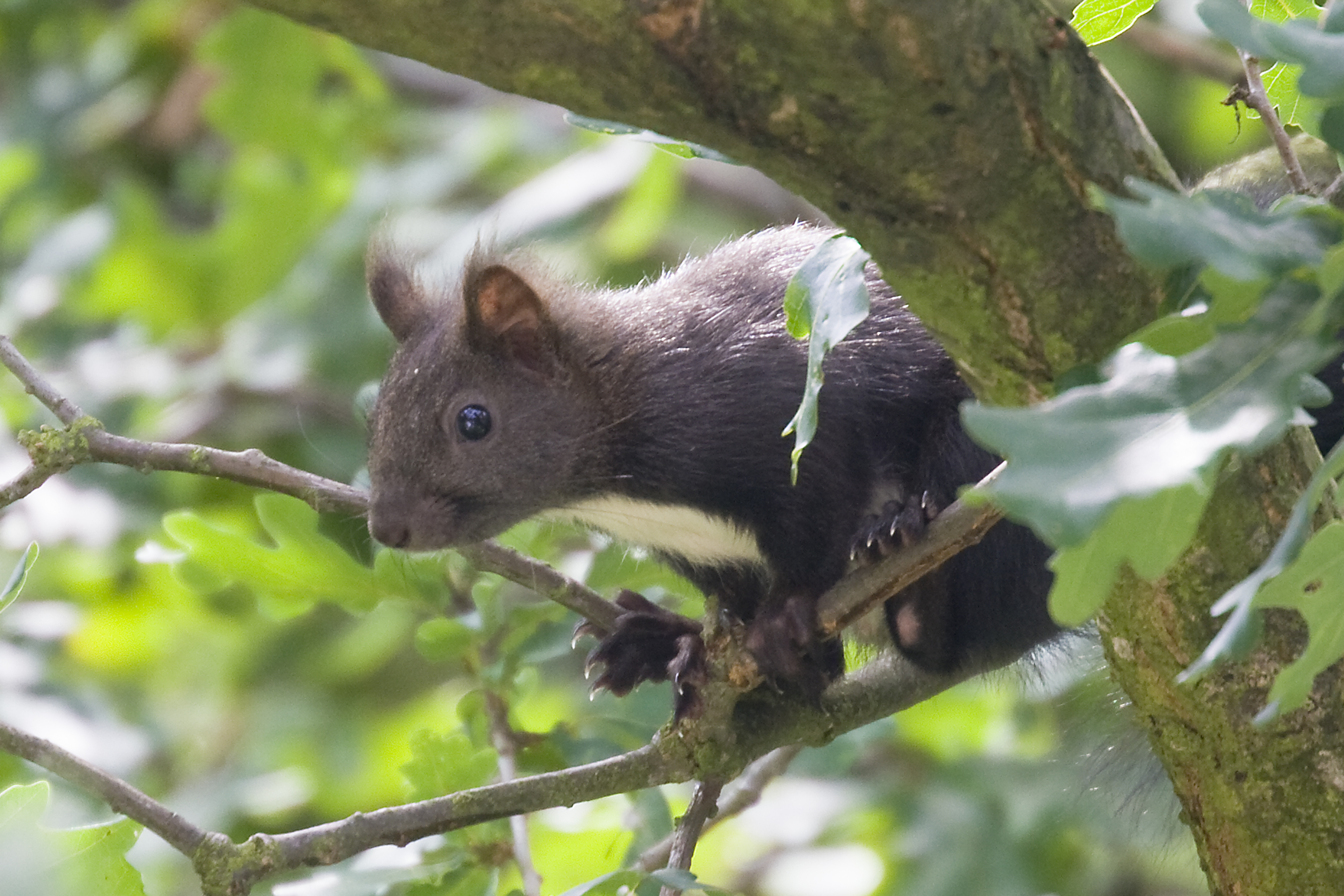 schwarzes Eichhörnchen - Sciurus vulgaris